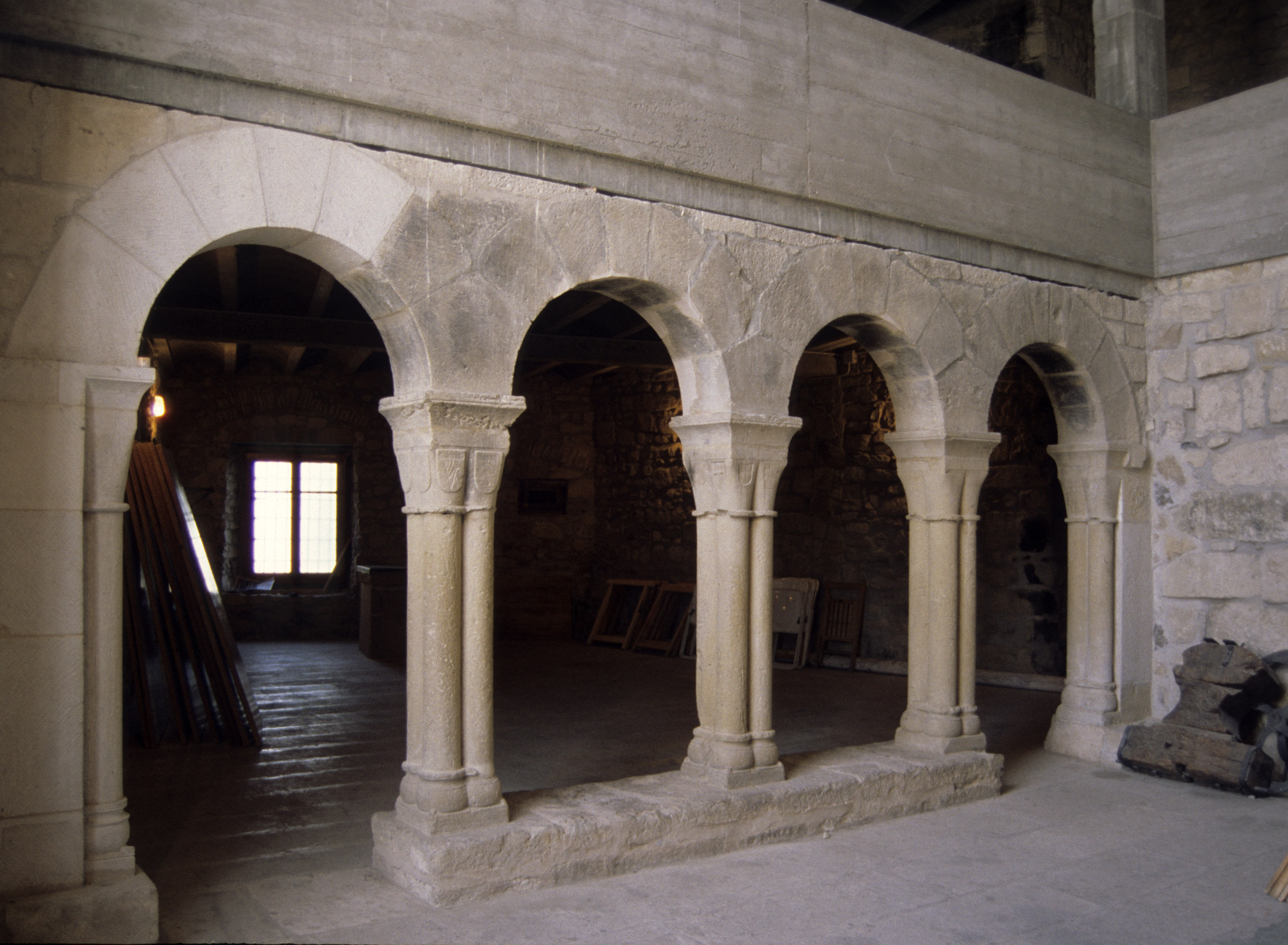 Santuari de la Bovera, Guimerà. Galeria de l'antic monestir, 1998.